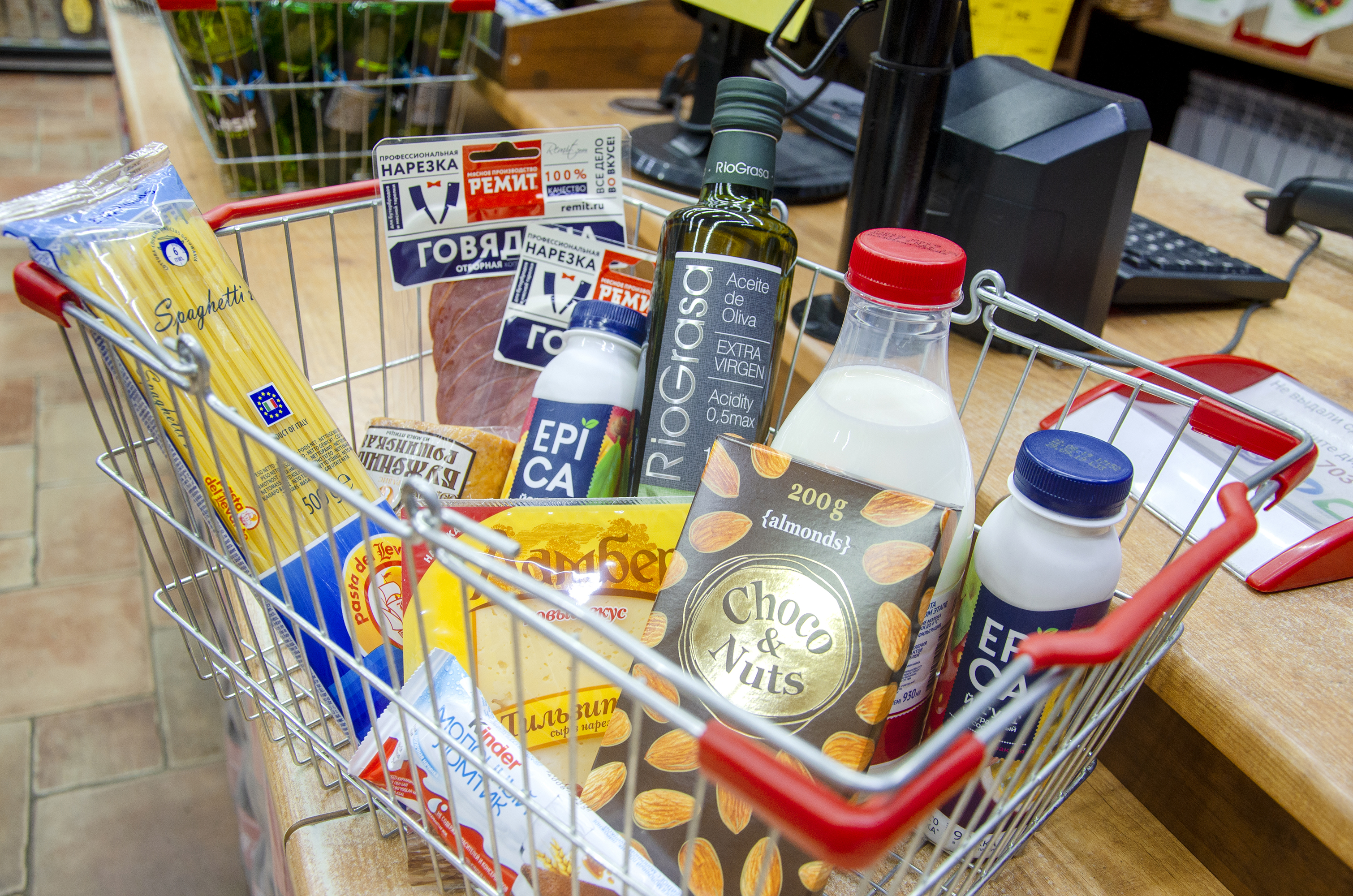 Покупки в магазине "Красное & Белое"